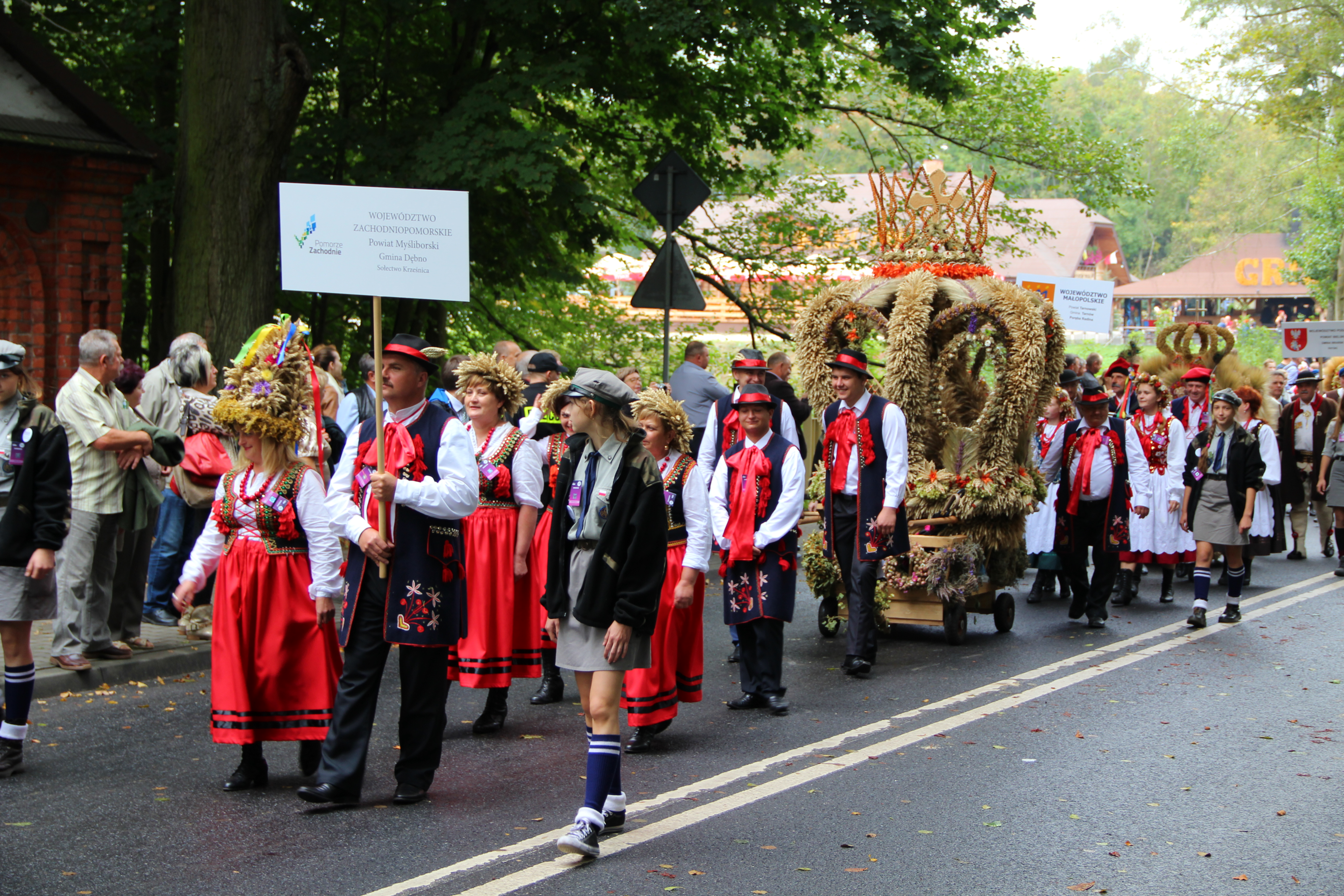 Presidential Harvest Festival in Spała 2014, parade